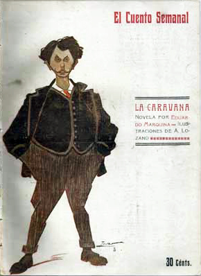 Portada de La caravana.